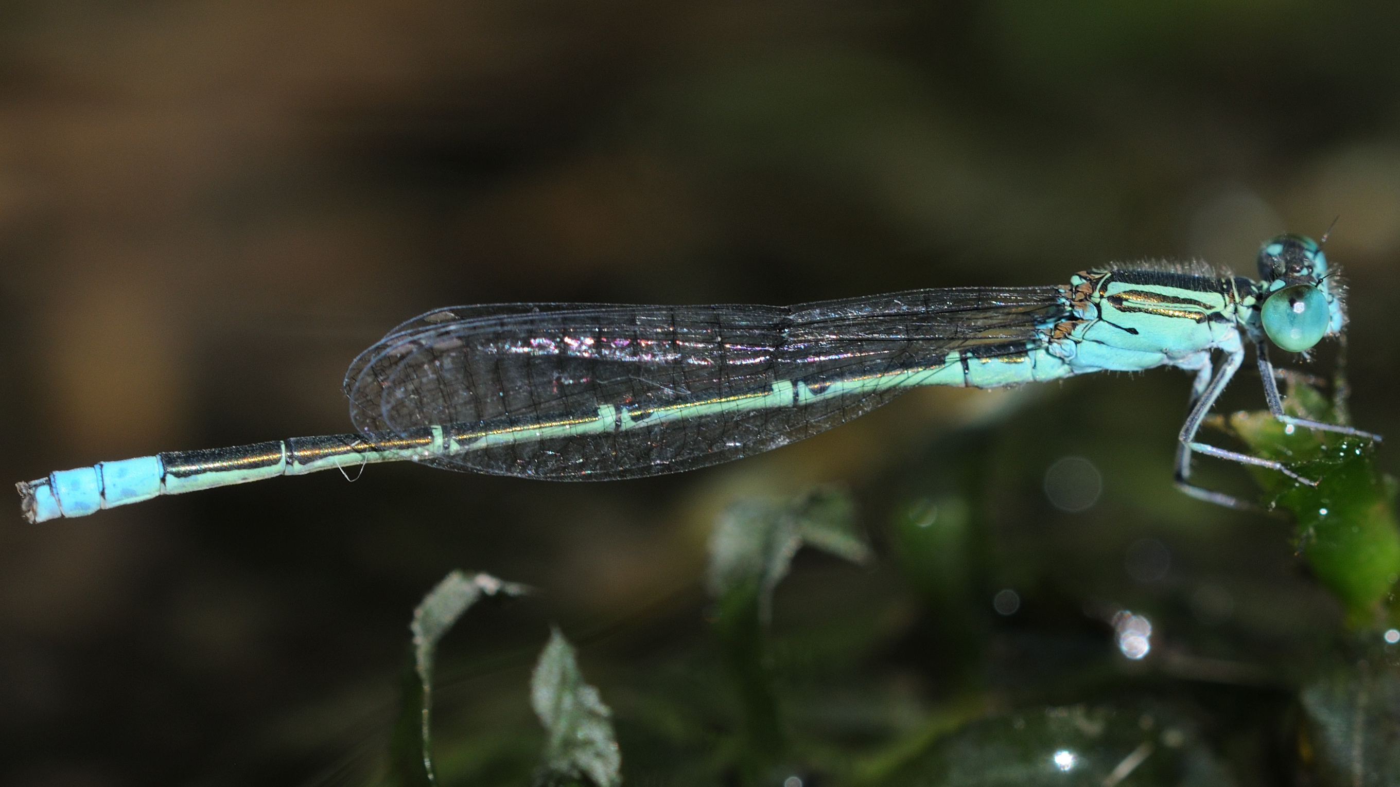 セスジイトトンボ雄 広島県